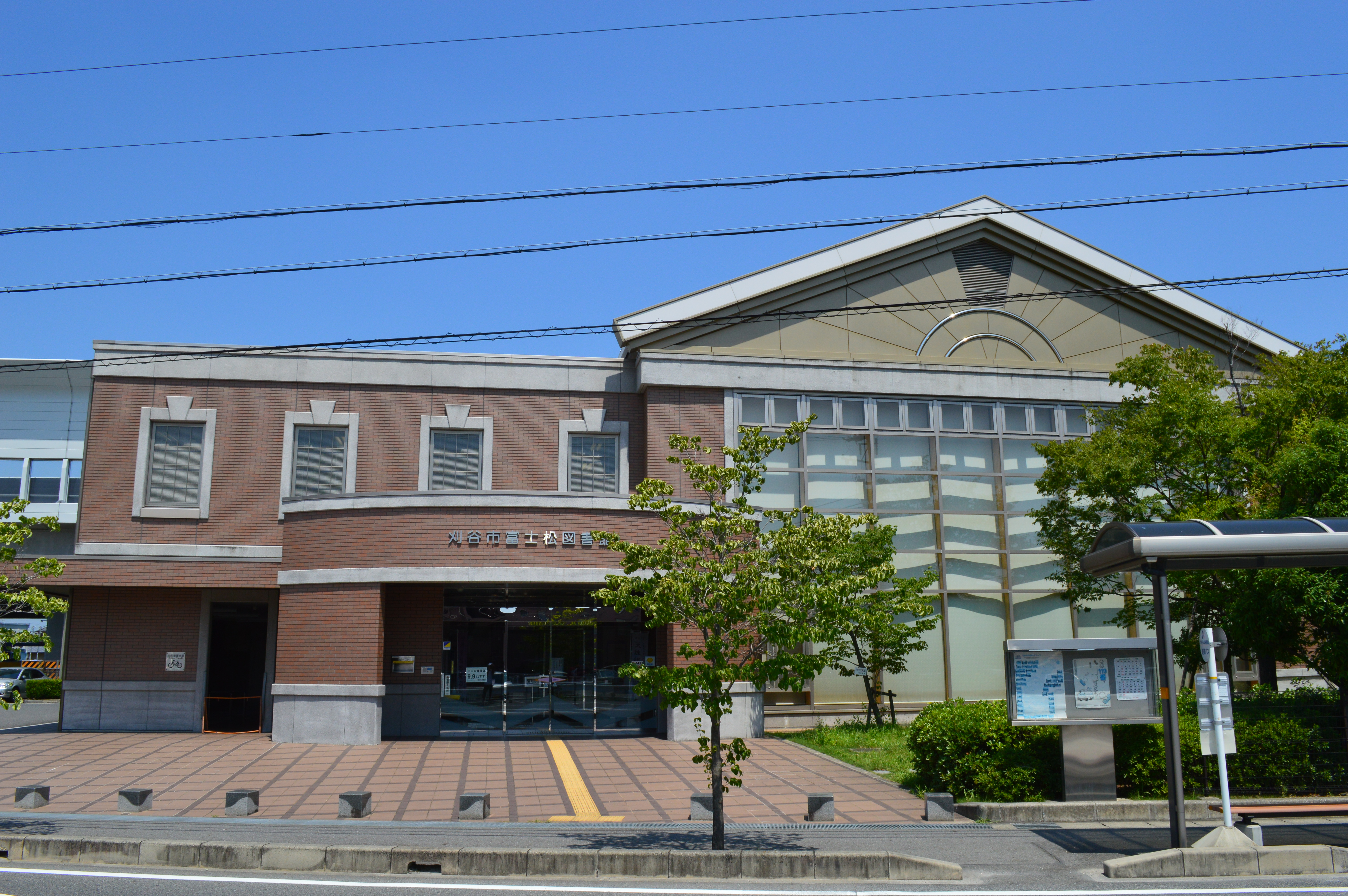 愛知県刈谷市にある刈谷市富士松図書館。